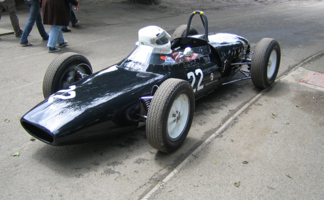 Lotus 18/21 F1 Pau GP 2007